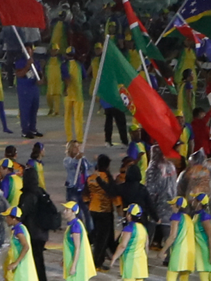 Rio de Janeiro - Cerimônia de encerramento dos Jogos Olímpicos Rio 2016, no Maracanã (Fernando Frazão/Agência Brasil)